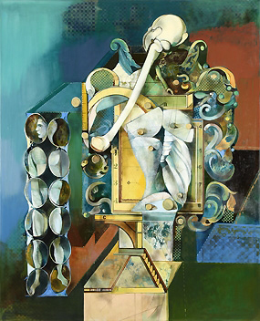 Endre Nemes, Setkání s barokem, 1968-79, alej, akryl a tempera na plátně, 220x180 cm